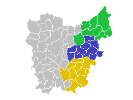 Het uitzendgebied van de regionale zender TV Oost in de Vlaamse provincie Oost-Vlaanderen.